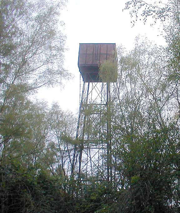 Der Wasserturm des stillgelegten Kohlenbergwerks Minden bei Minden in Nordrhein-Westfalen. Der Wasserturm gehörte zur Schachtanlage Notthorn.